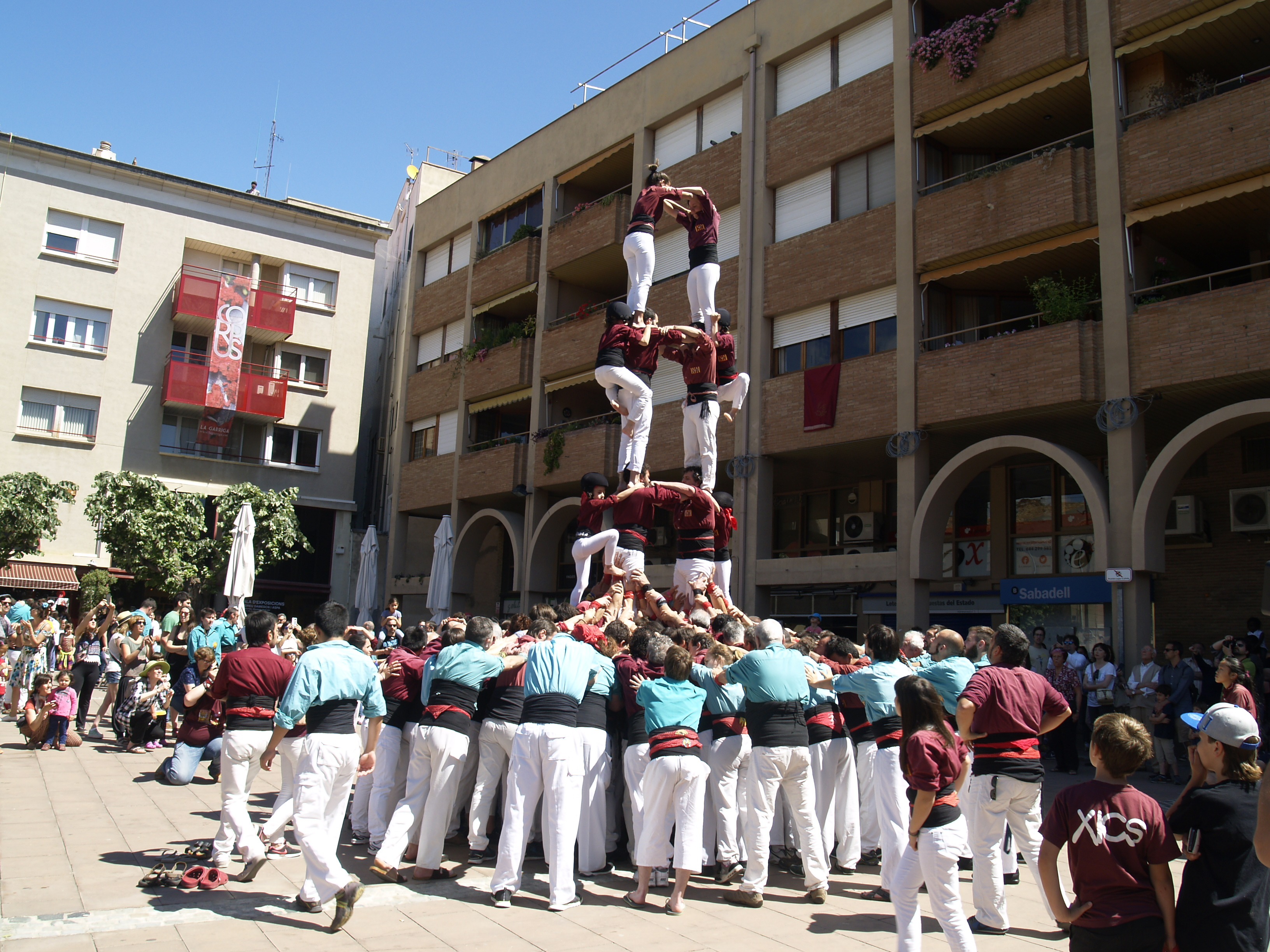 Alfombras de Corpus de la Garriga This is a photography of a Folklore festival in Spain (Wikidata id Q21479929).